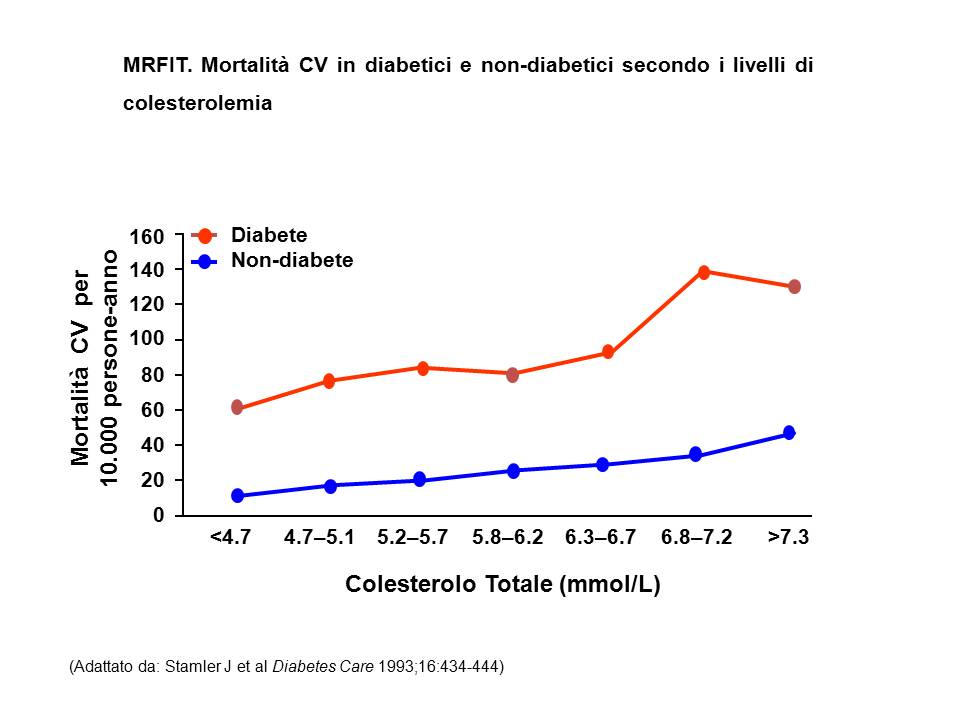 Effetto sinergico di diabete e colesterolemia sulla mortaltà CV